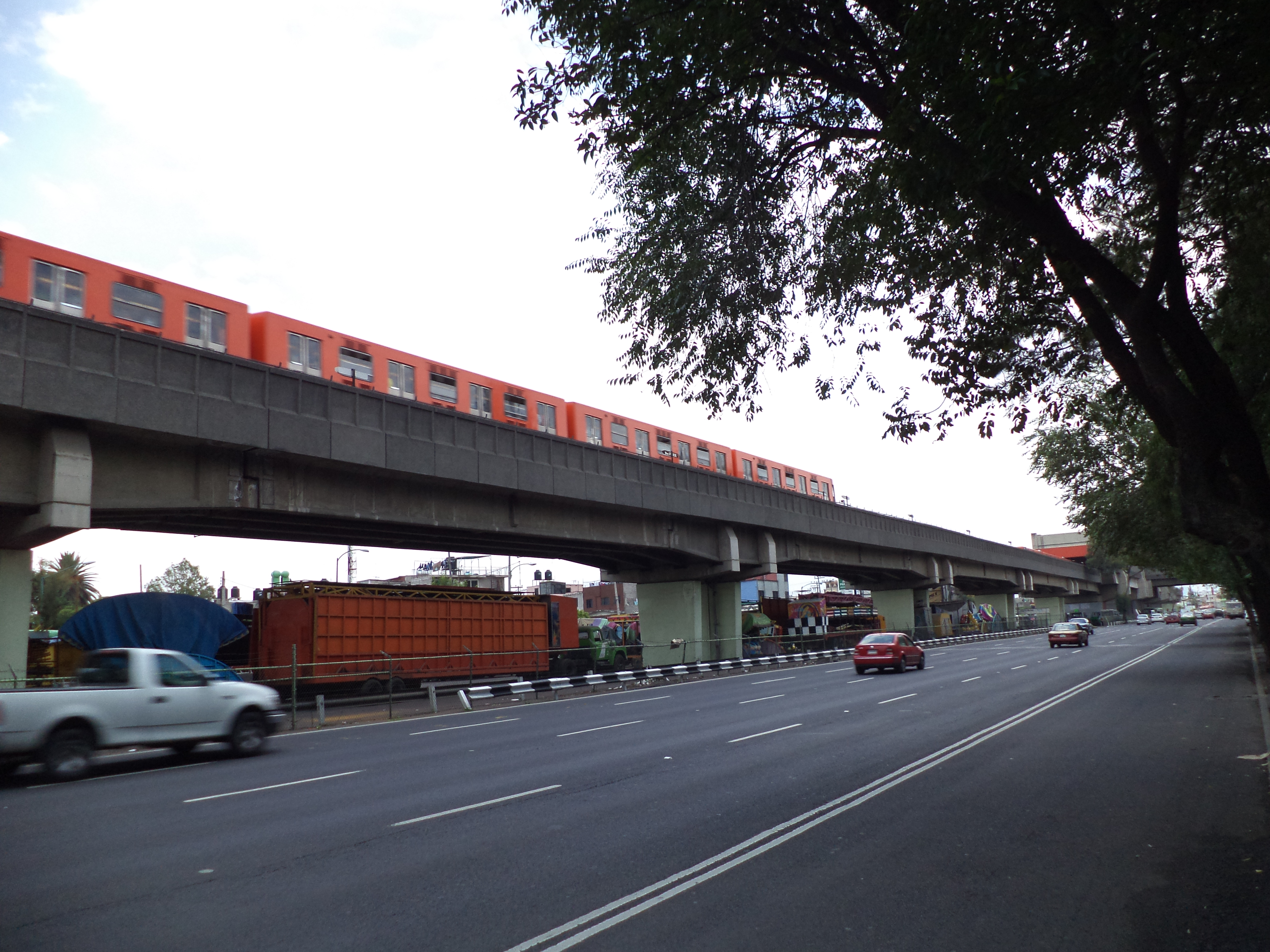 Linea 9 tramo elevado